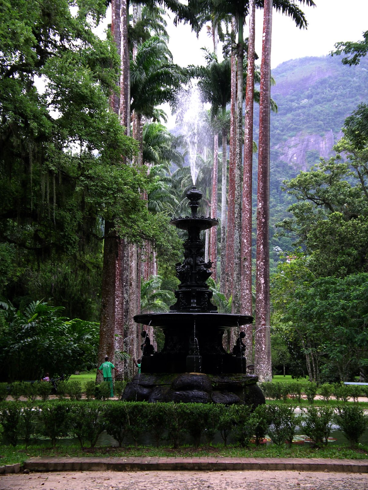 Botanical Gardens of Rio de Janeiro